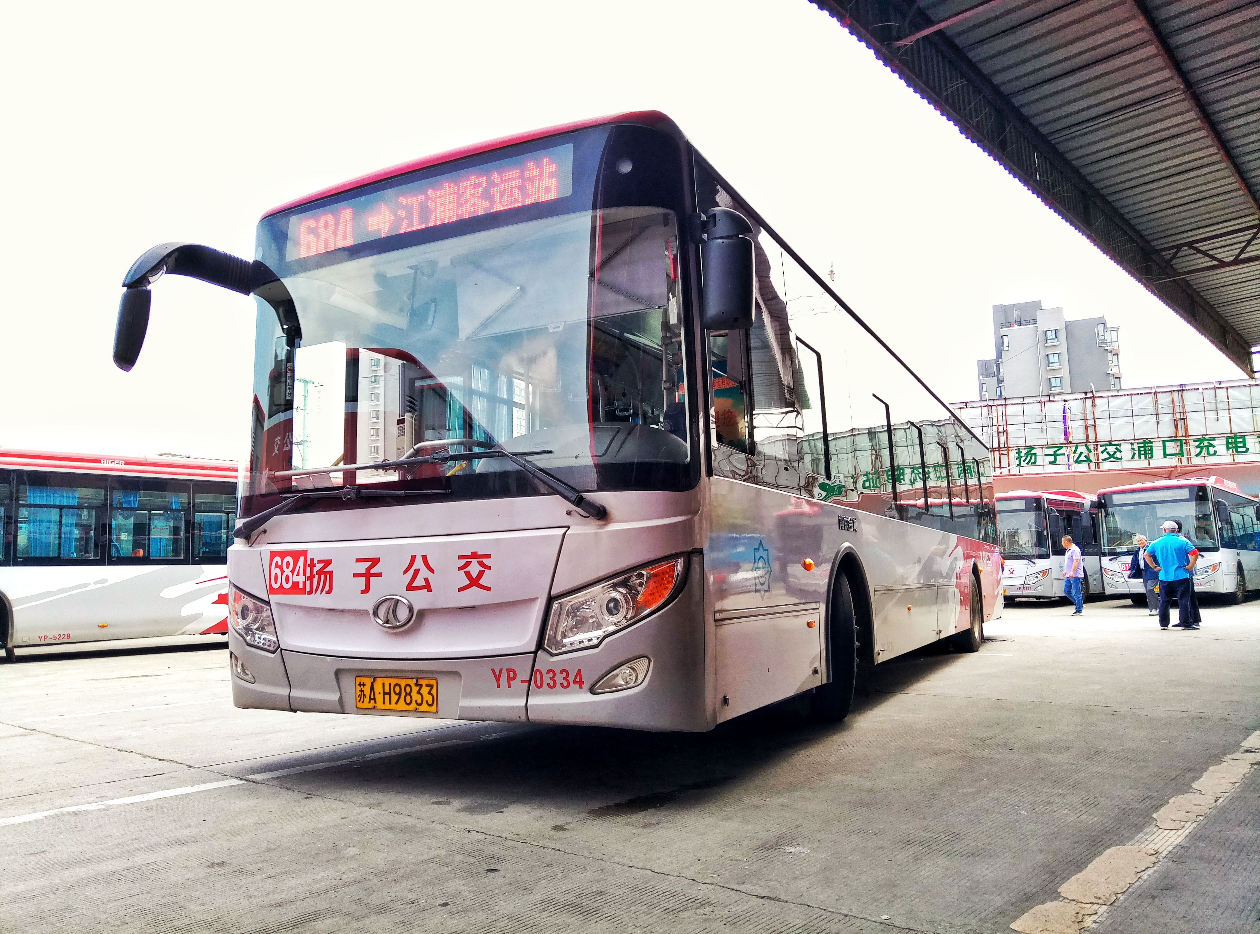 南京公交684路使用的南京金龙纯电动客车